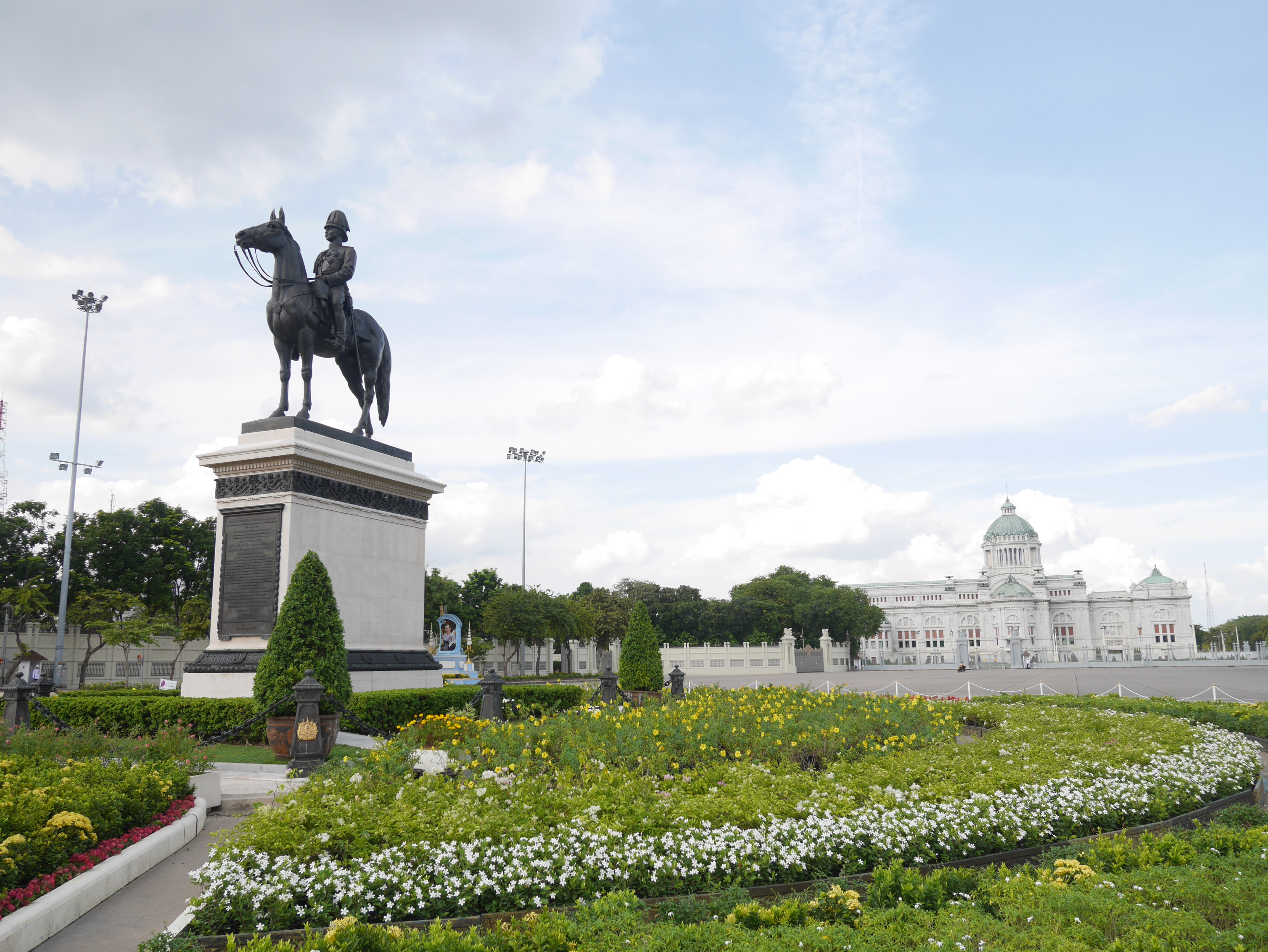 เจ้าของบัญชี กสิณธร ราชโอรส เป็นเจ้าของบัญชีเดียวกับ บัญชี Phonlakrit Sunthornphon ของ Facebook บัญชี Tsutomu RIkimi ของ Google และ Panoramio .com บัญชี ซูบารุโยของ กสิณธร ราชโอรส same account holder of Facebook (Phonlakrit Sunthornphon),Google and (Tsutomu RIkimi) and ซูบารุโย at